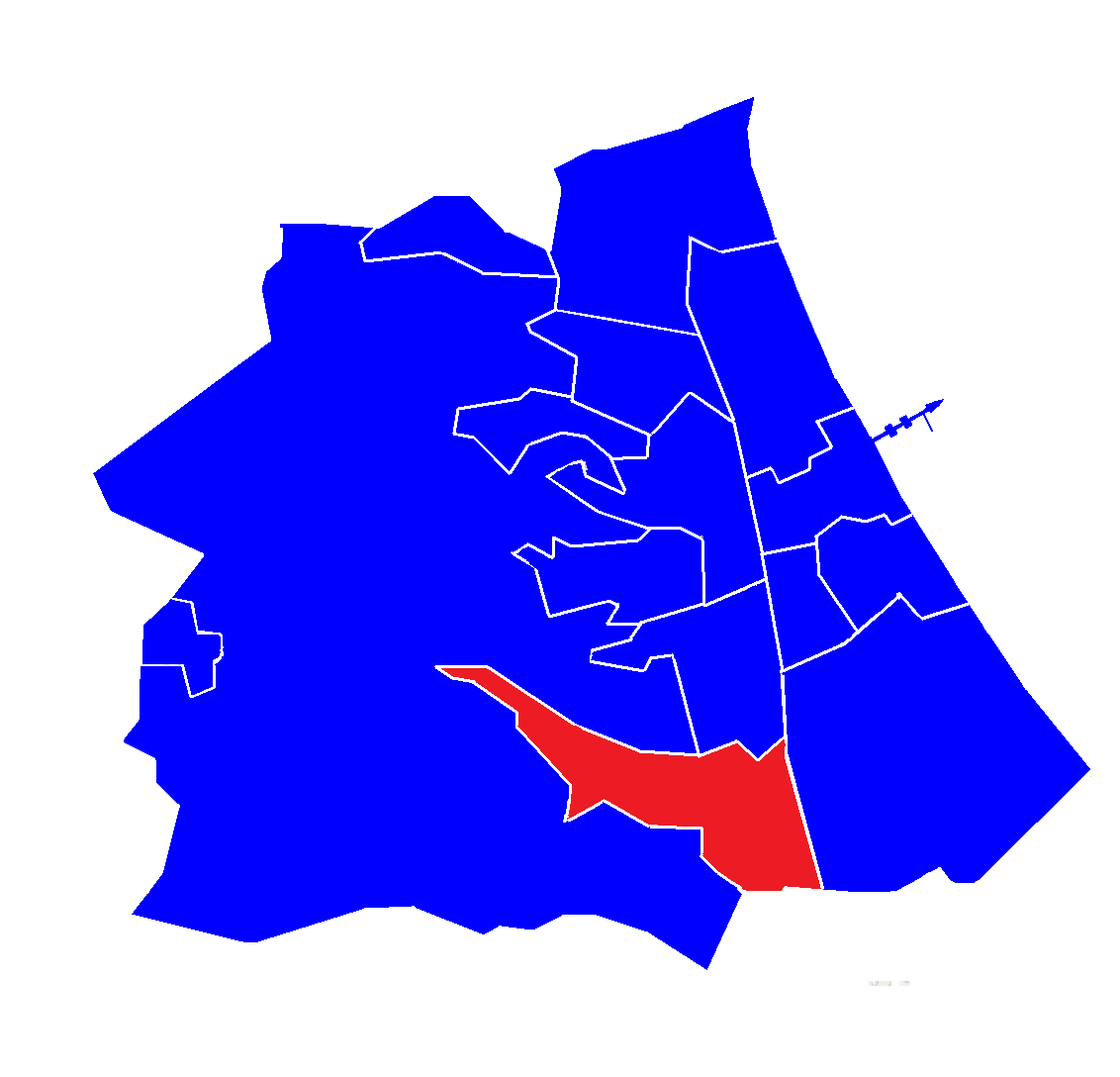 Świemirowo